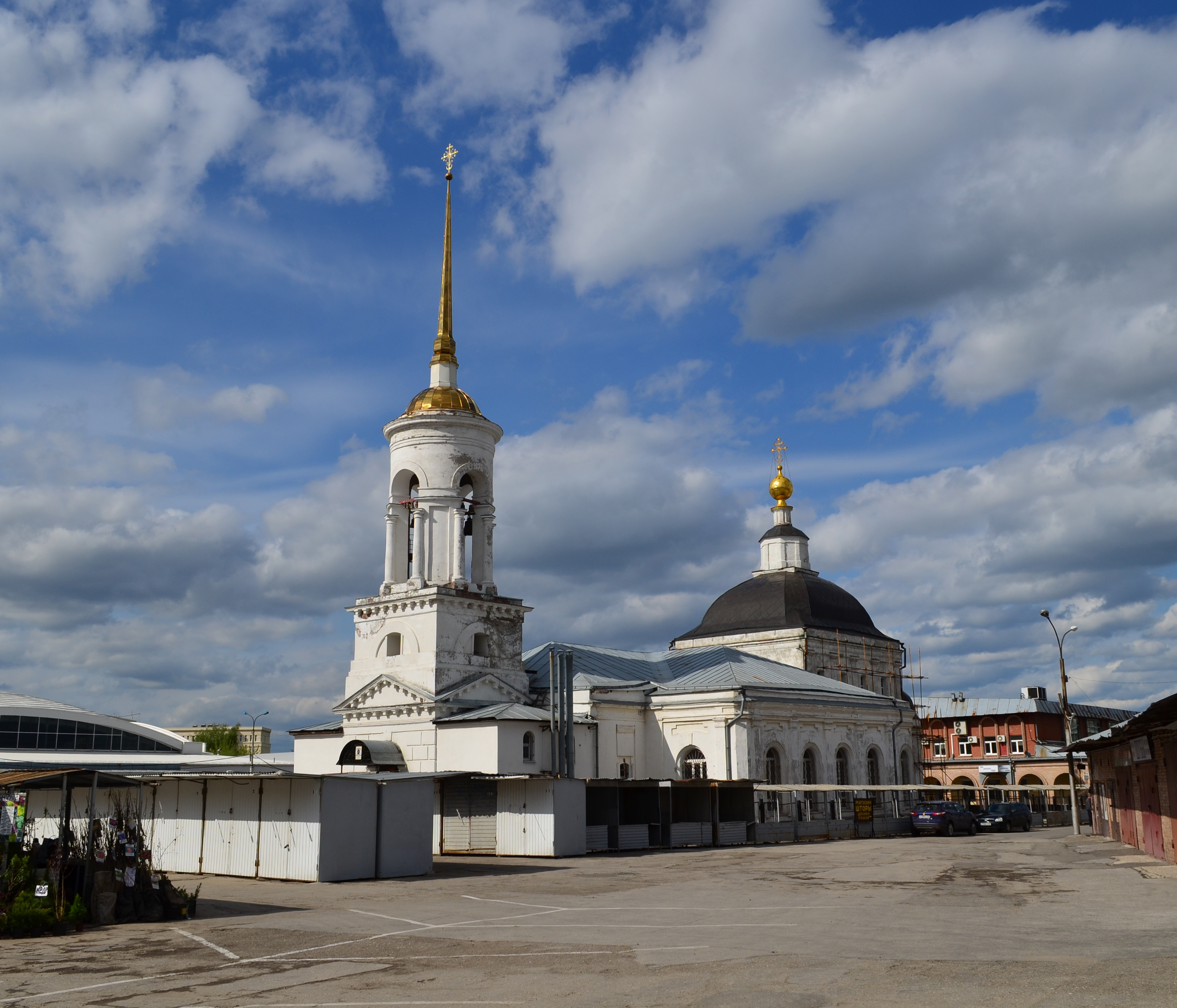 Рязань.Храм во имя великомученицы Екатерины.